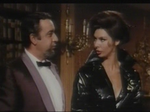 Fernando Rey (Goldginger) e Gloria Paul (Marlene) in Due mafiosi contro Goldginger (1965). Fotogramma, da La F.